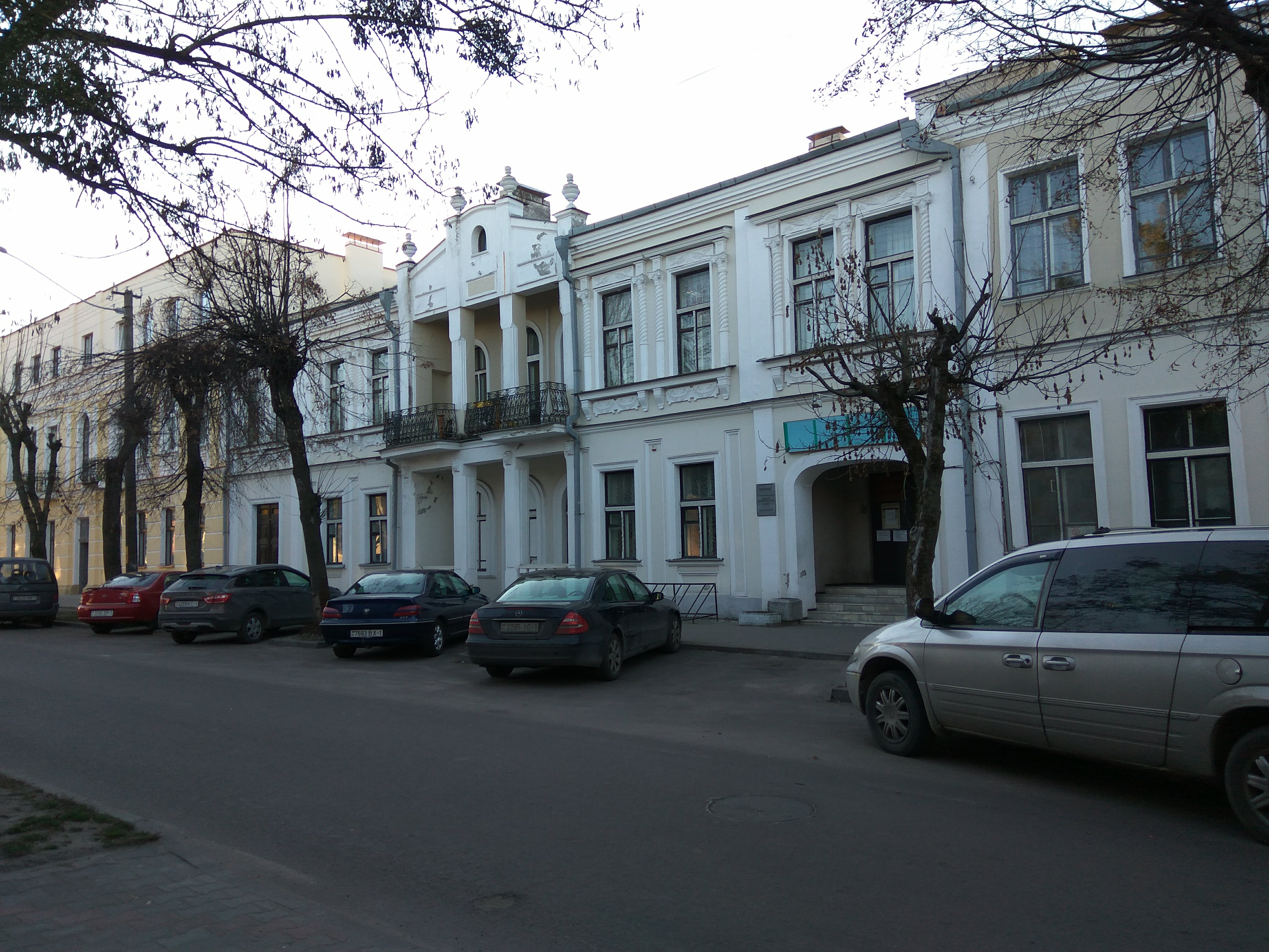 Брэст. Вуліца Савецкіх пагранічнікаў